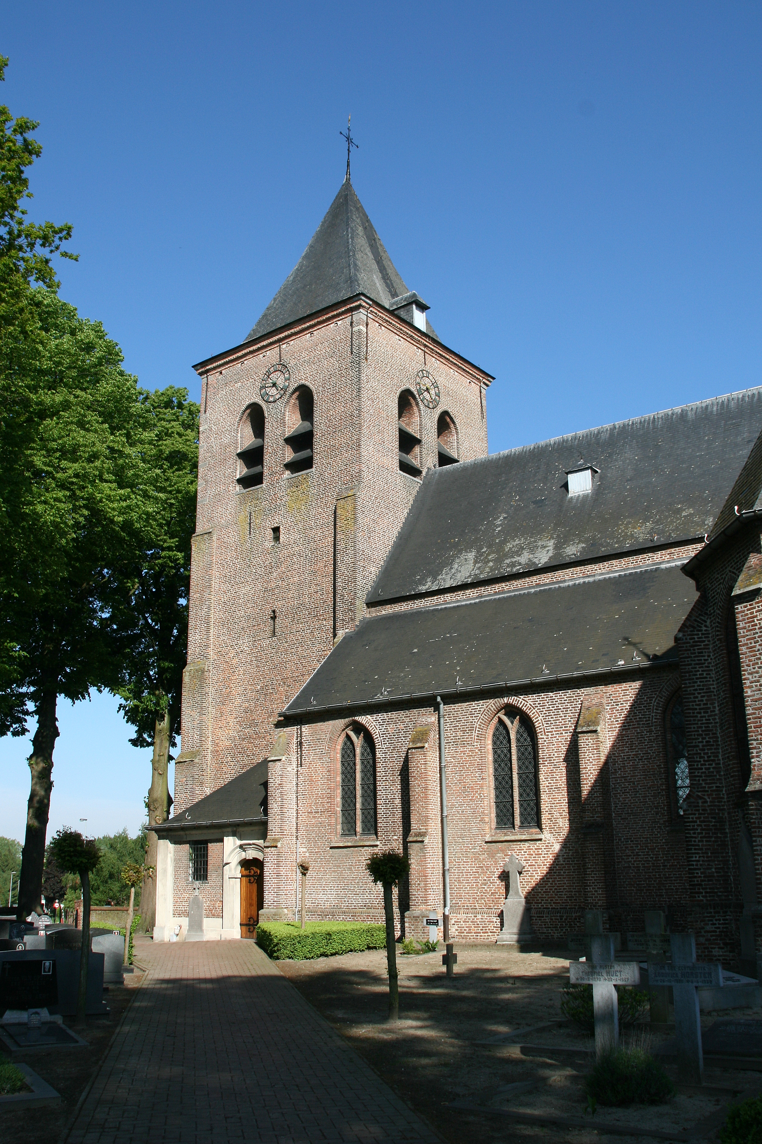 Sint Jan Baptistkerk - Dit sobere gotische dorpskerkje dateert uit de 15e eeuw, al kan het benedengedeelte van de kerk wel ouder zijn. De massieve toren heeft een vierkant grondvlak met zijden van 8 meter, een muurdikte van 1,2 meter en een hoogte van 35 meter.